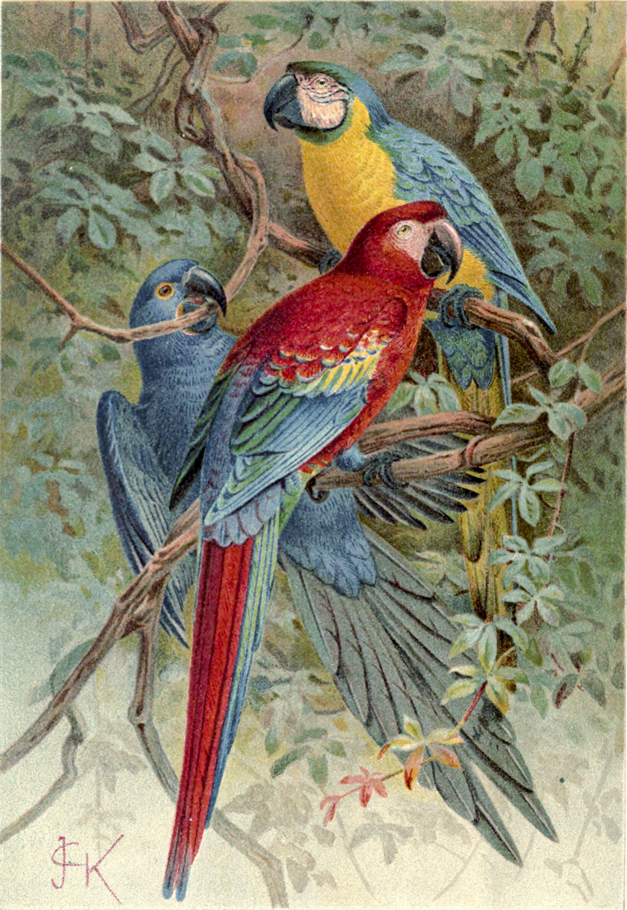 Macaws (Anodorhynchus hyacinthinus?, Ara chloroptera?, Ara ararauna)